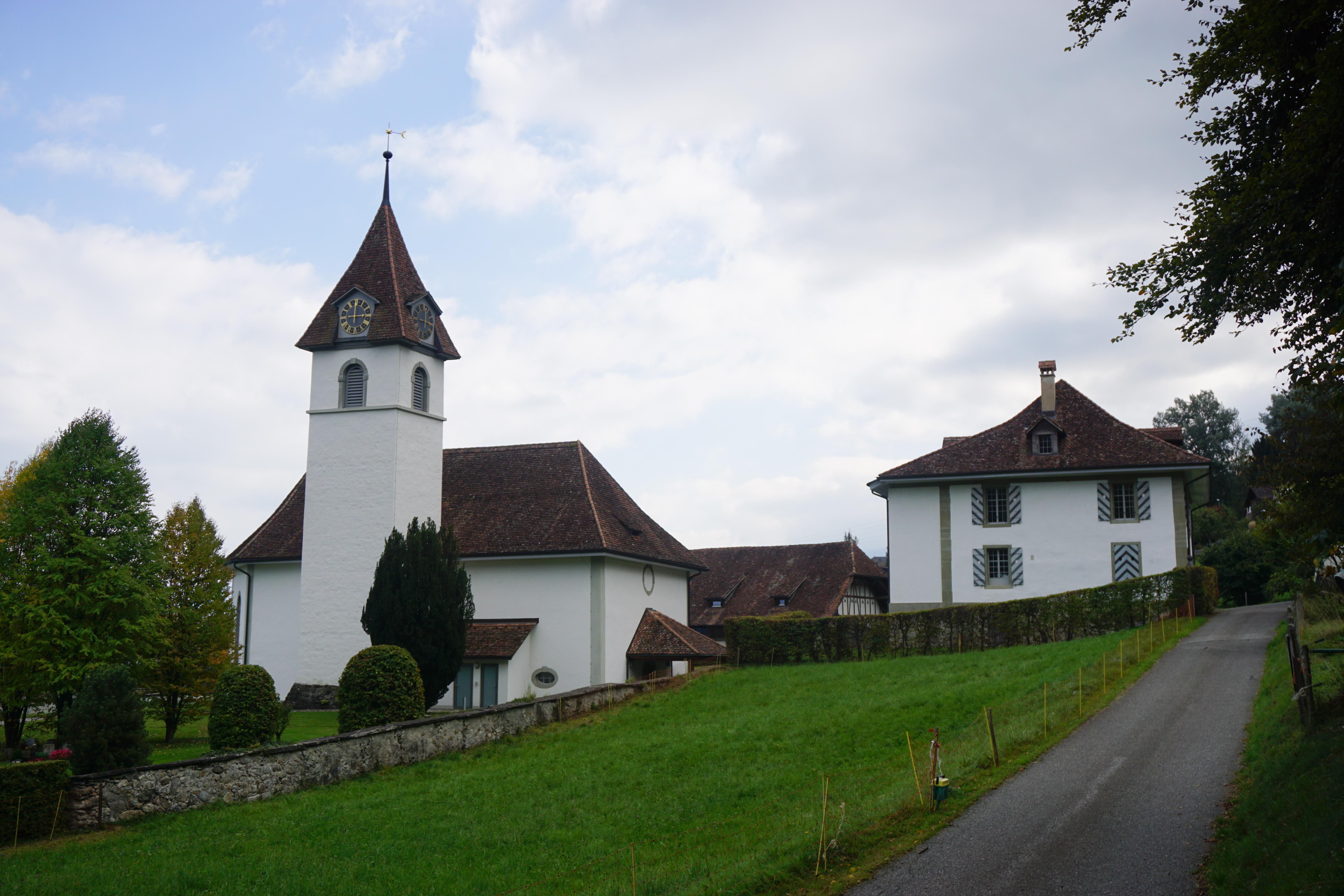 Reformierte Kirche mit Pfarrhaus, vom Friedhof